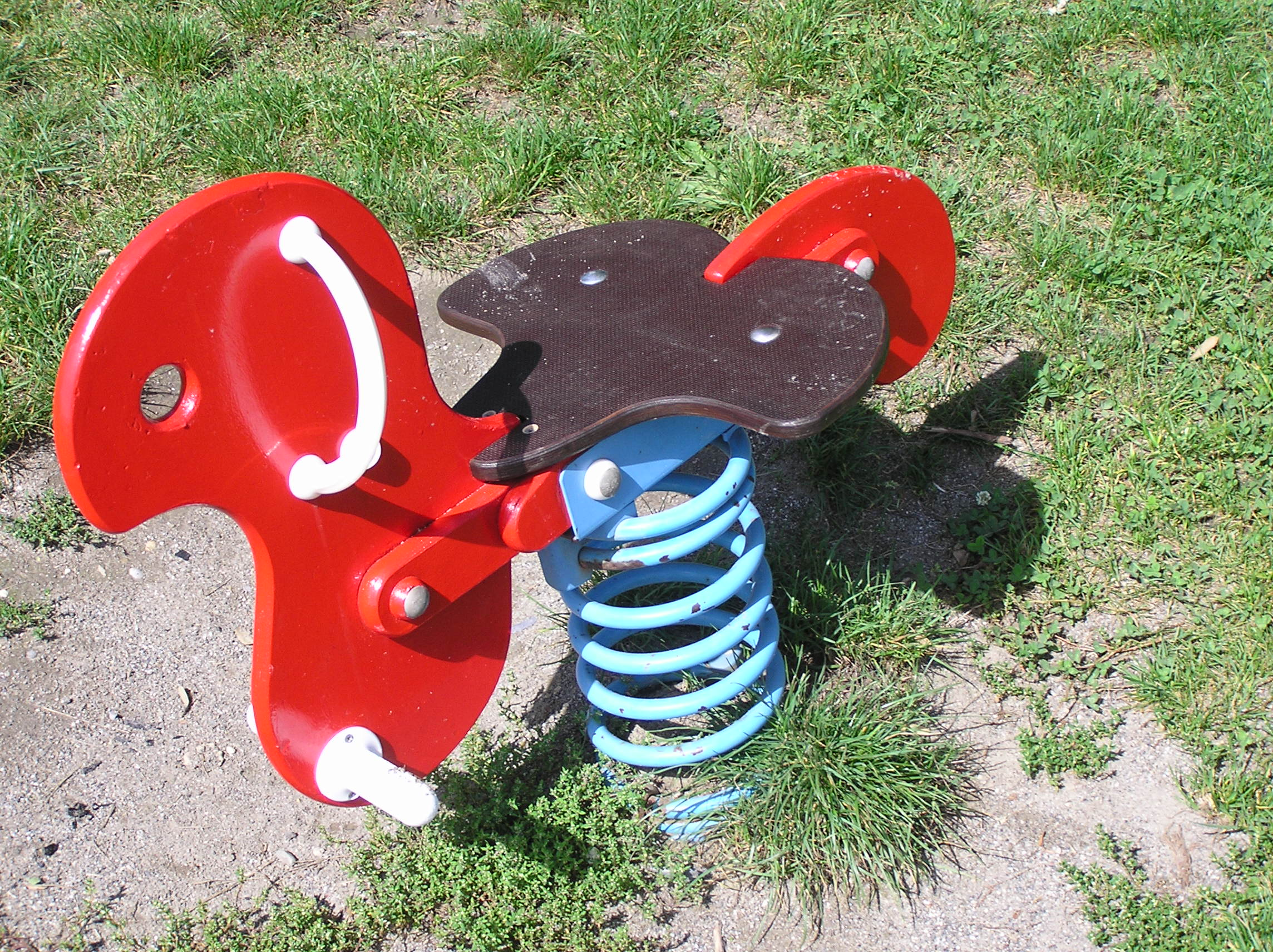 Objekt: Spielplatz-Schaukelpferd mit Stahlfeder in Konstanz, Raiteberg